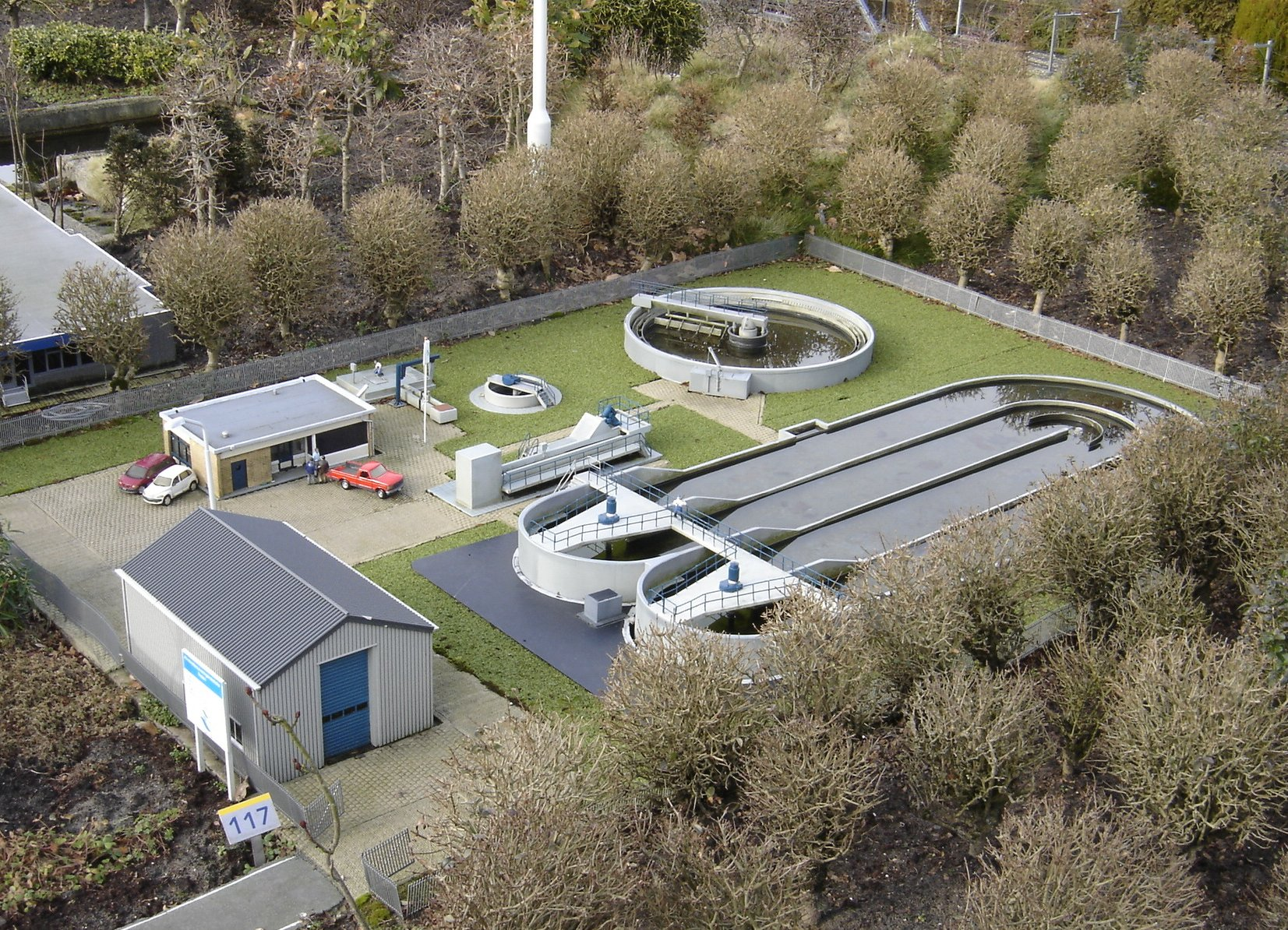 Waterzuivering van Tholen, Madurodam, February 19, 2006